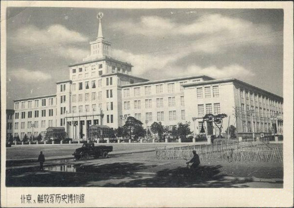 1959年的解放军历史博物馆。